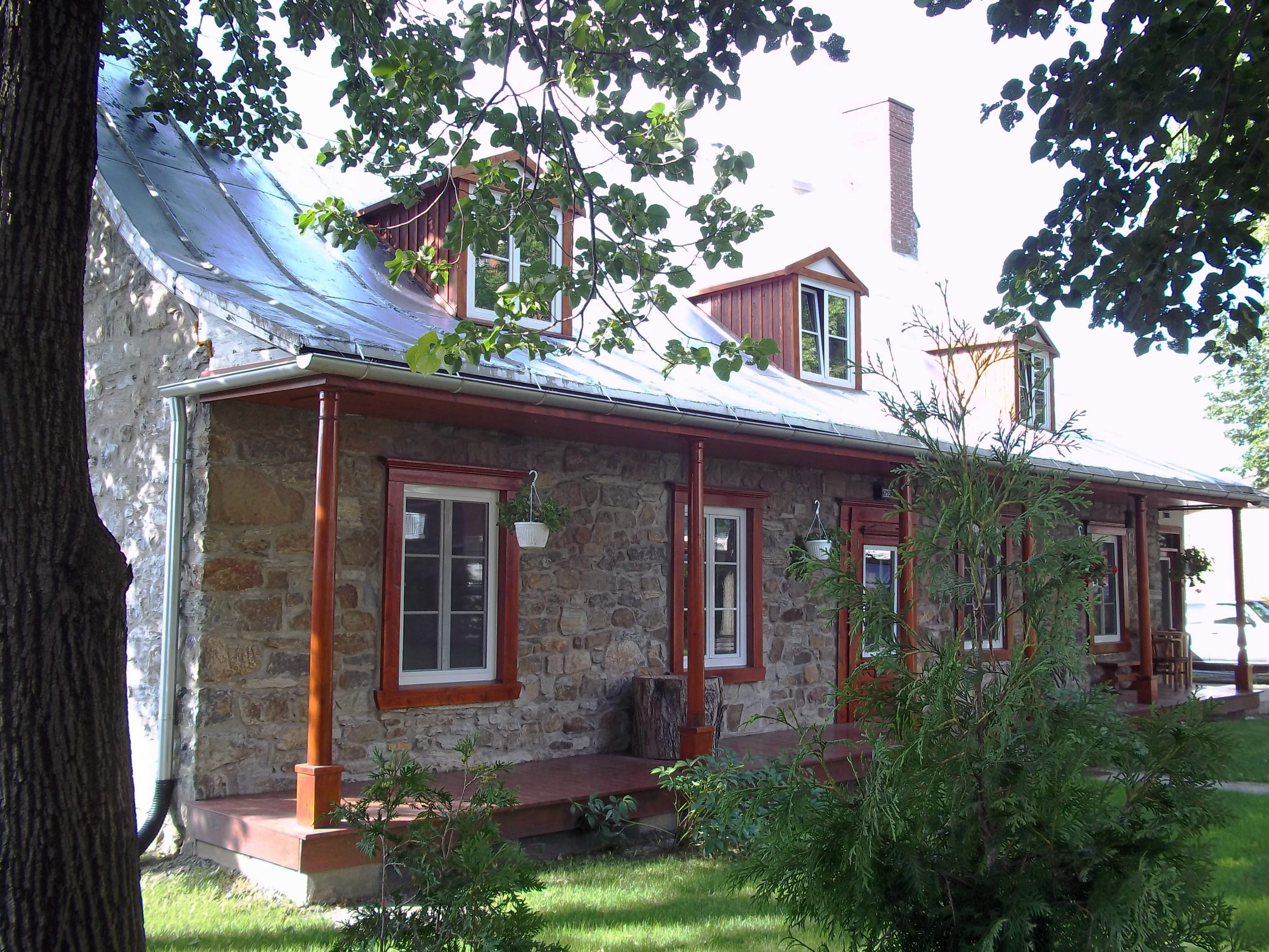 Maison Gervais-Roy, 6255, rue Jarry Est, Montréal